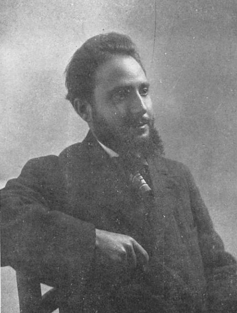 Fotografía de Joan Puig y Ferrater, autor de La dama enamorada, obra de Pablo Audouard.